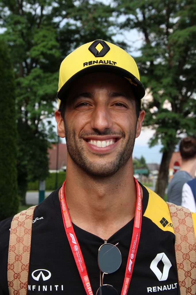 Formula 1 2019 / Schloss Gabelhofen